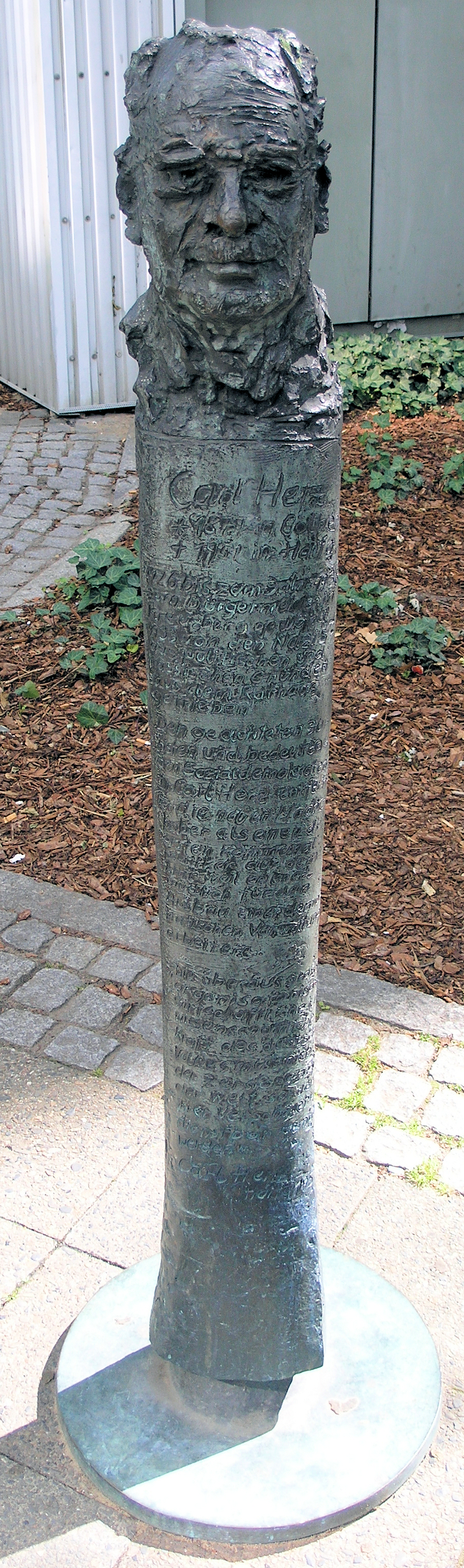 Gedenkstele, Carl Herz, Yorckstraße 4, Berlin-Kreuzberg, Deutschland